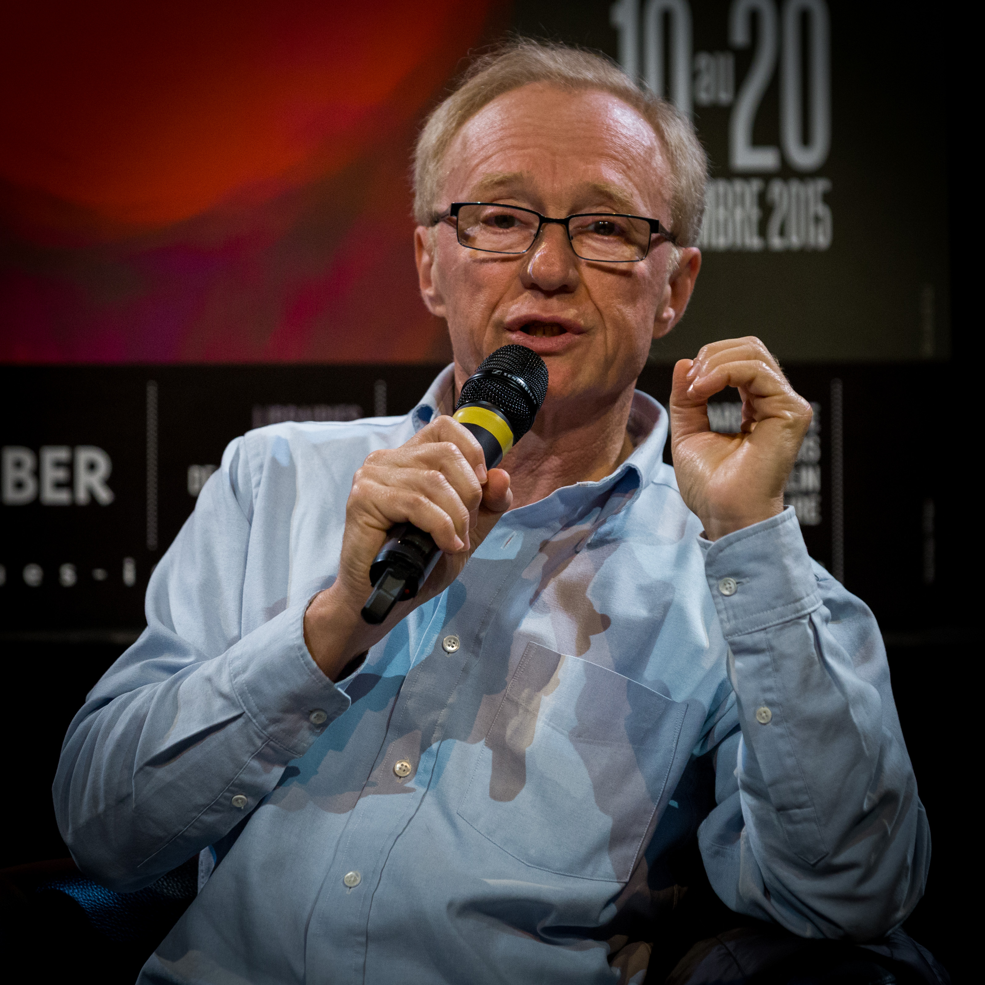 David Grossman lors de la soirée prologue des Bibliothèques idéales, Strasbourg 4 septembre 2015